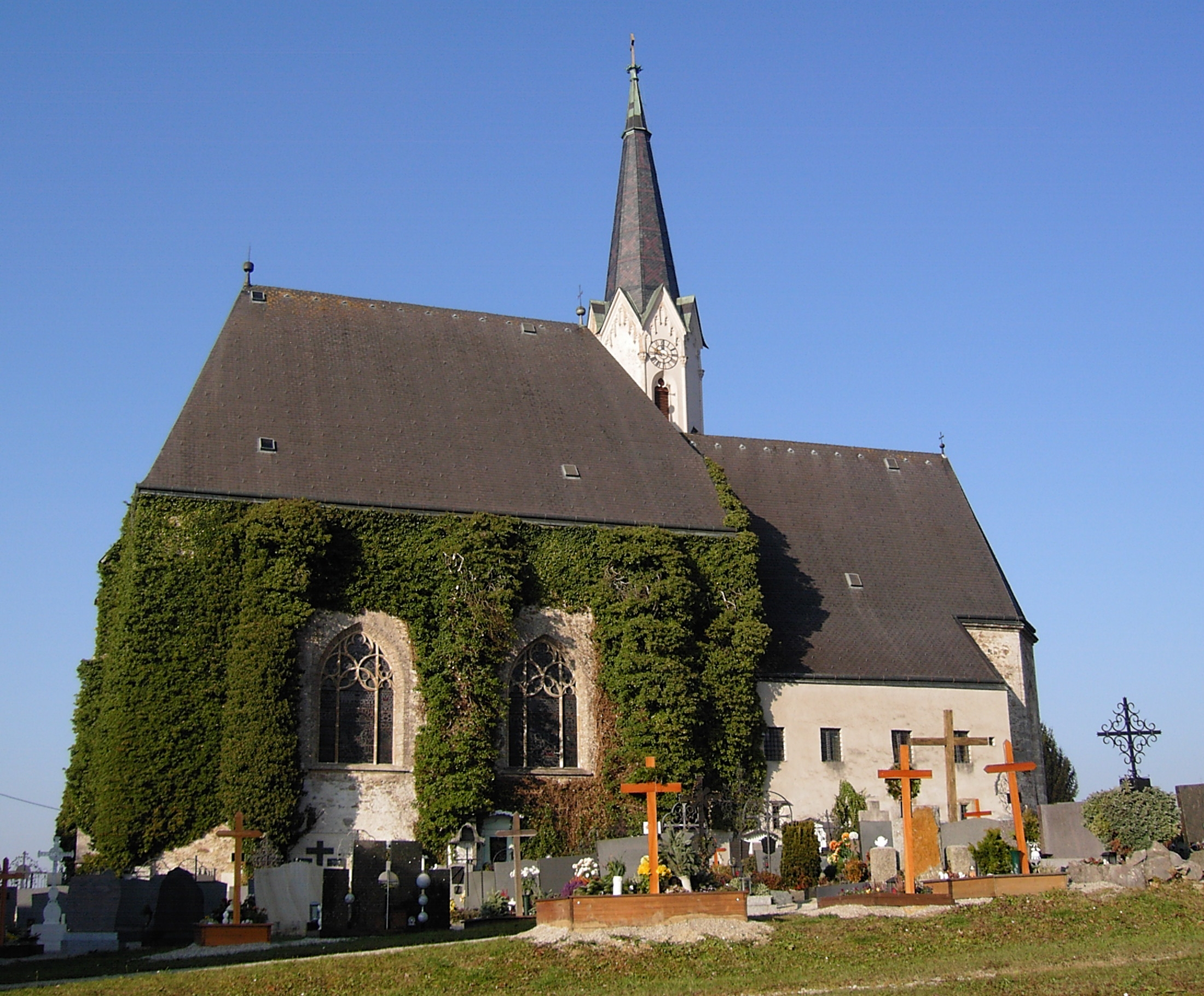 Sankt Ulrich bei Steyr Pfarrkirche Pfarrplatz This media shows the natural monument in Upper Austria with the ID gnd378.